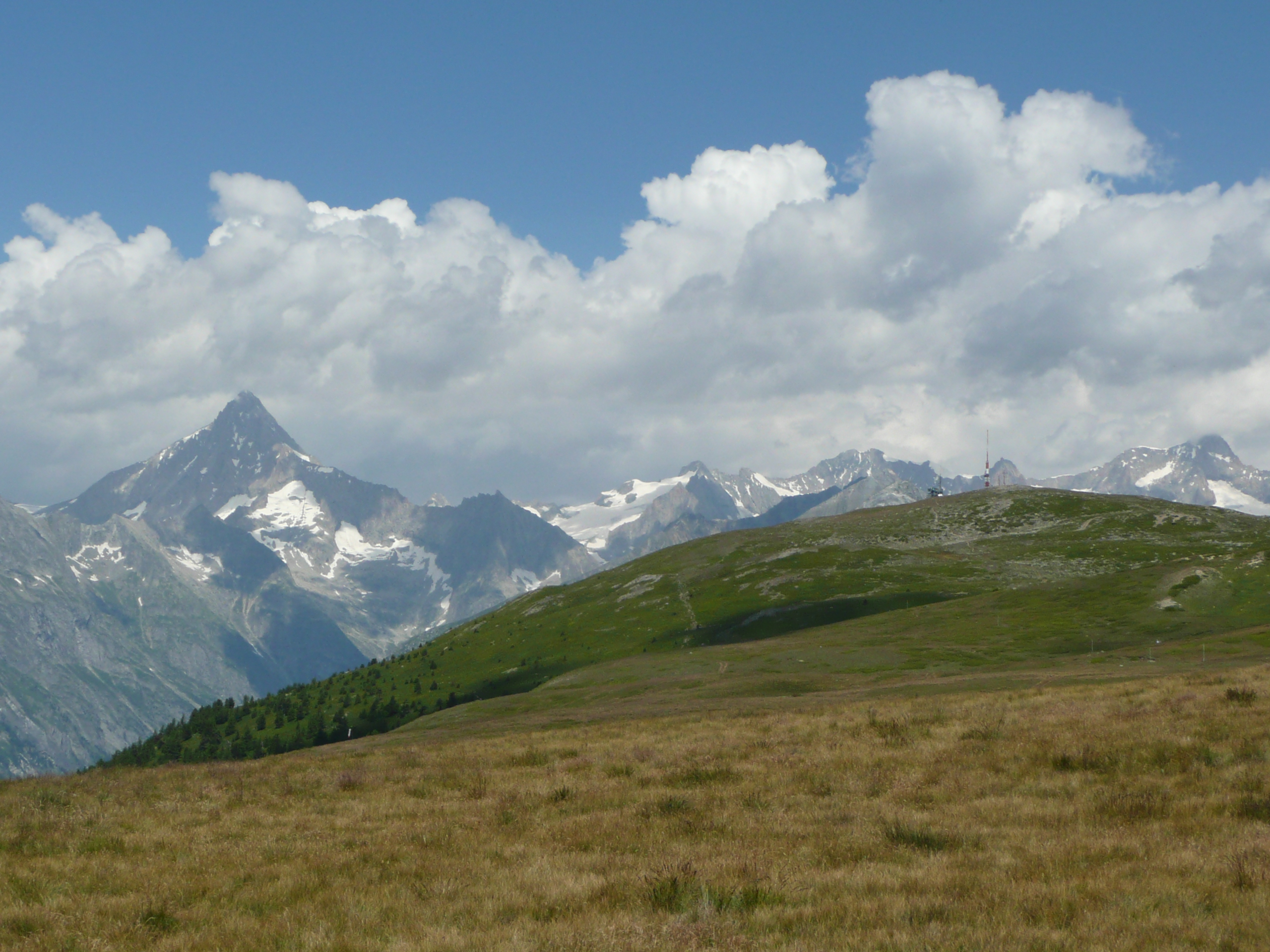 Der Gibidum oberhalb von Visperterminen.